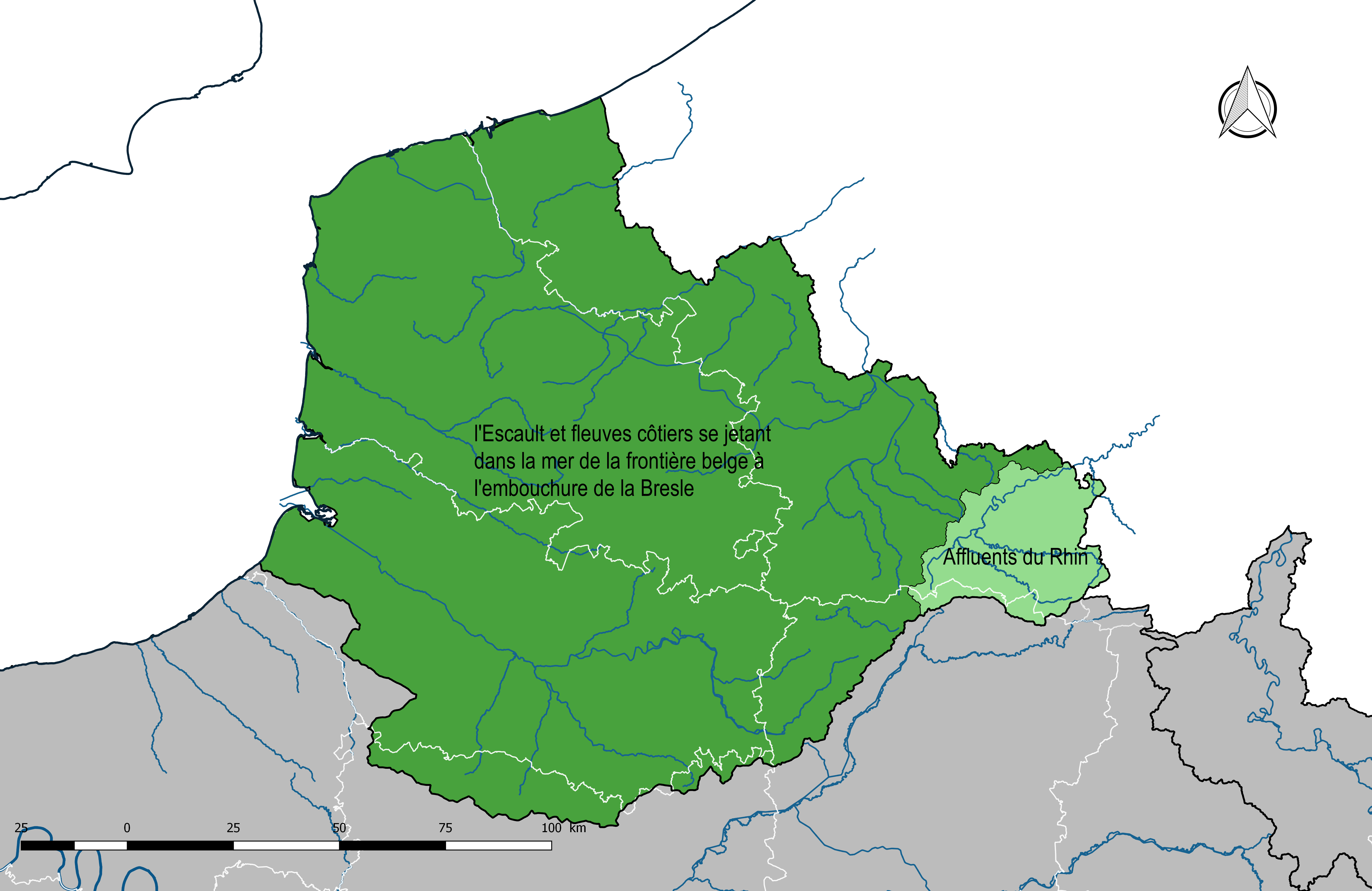 Carte du bassin hydrographique Artois-Picardie (France) et de son découpage en régions hydrographiques.